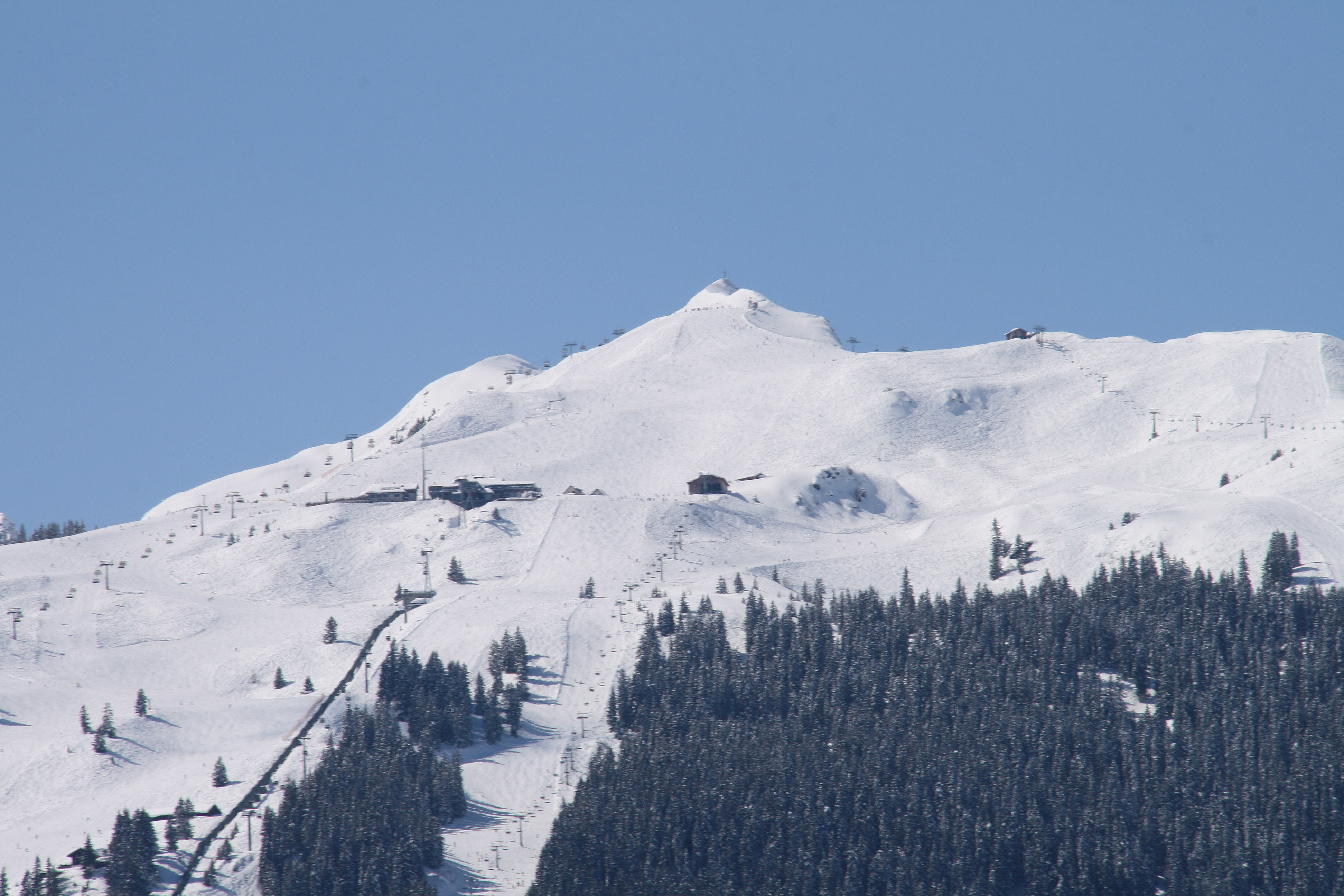 Blick vom Bergpanoramastandort neben der Kirche in Bartholomäberg auf die gegenüberliegenden Berge des Rätikon. Hier das Golmerjoch mit 2124m gelegen im Golmer Wintersport- und Wandergebiet im Montafon .